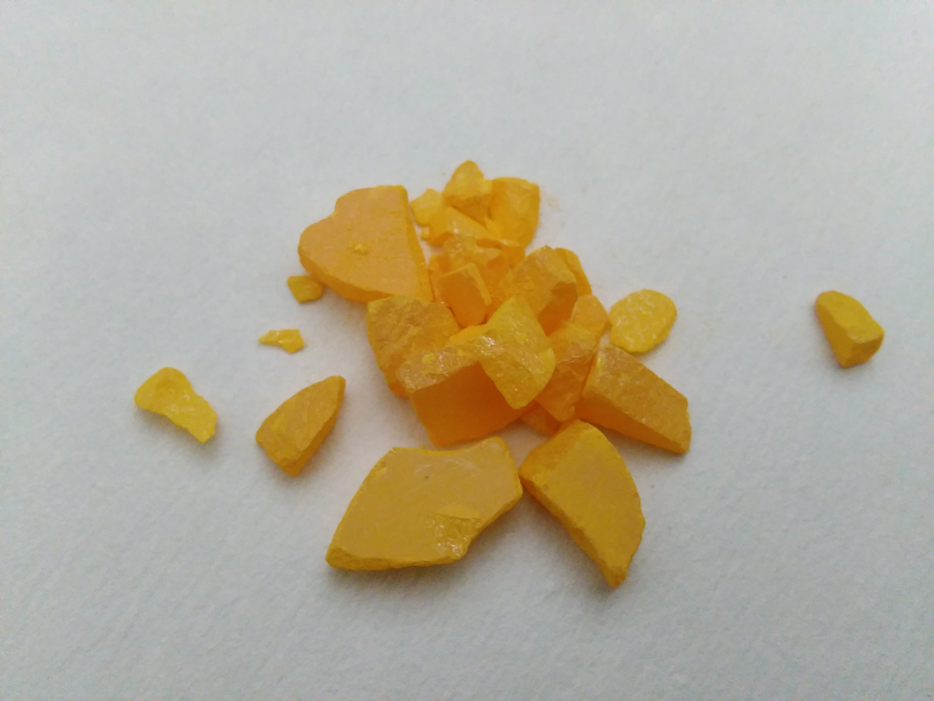 硒化锌，纯度99.99%